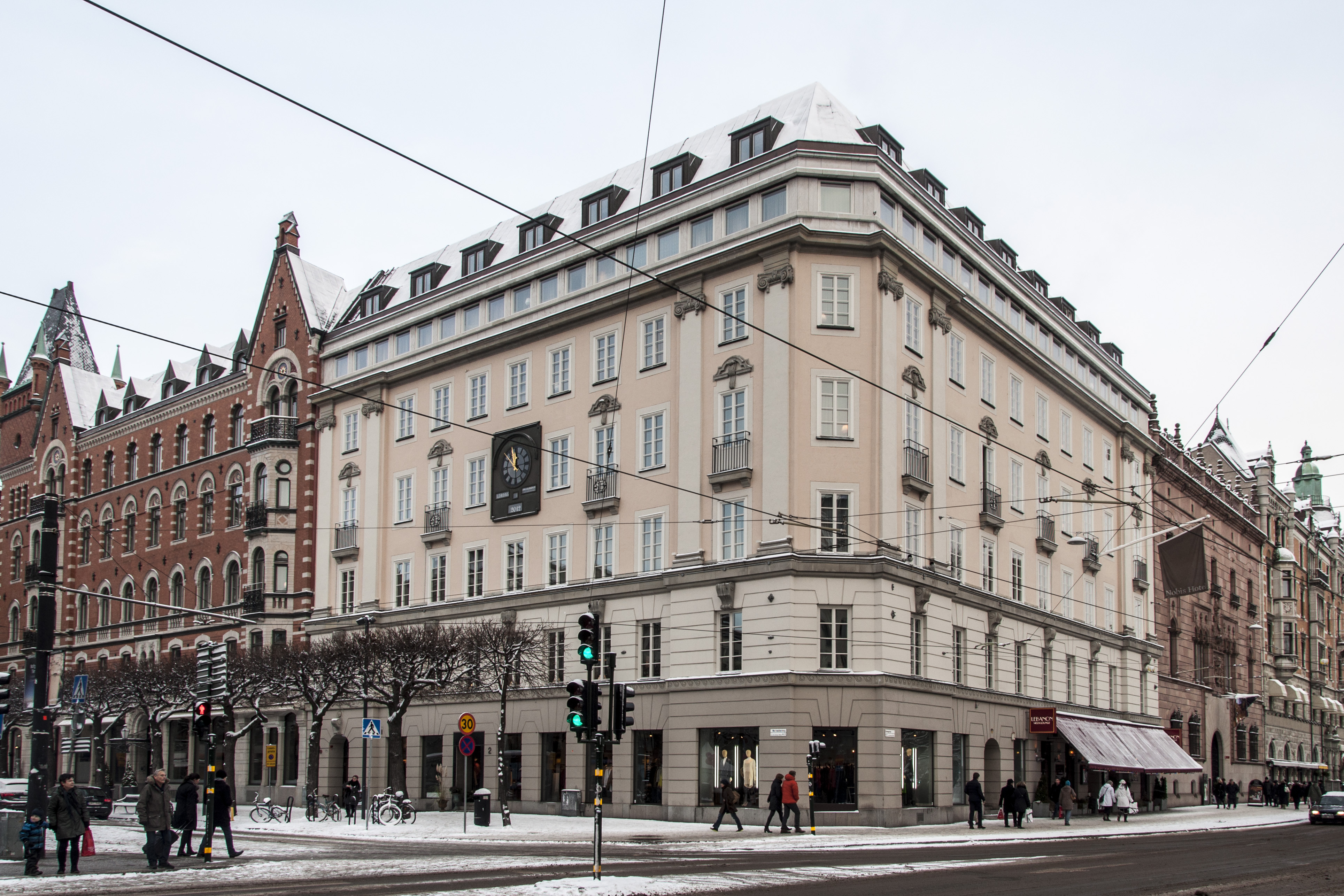 Skravelberget Mindre 9, Hamngatan 6, Norrmalmstorg 2